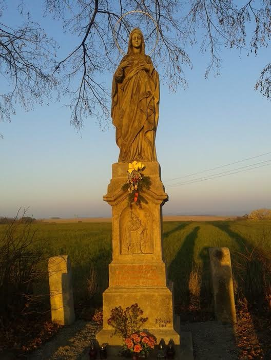 Panenka po rekonstrukci v roce 2015 za obcí Bačalky.